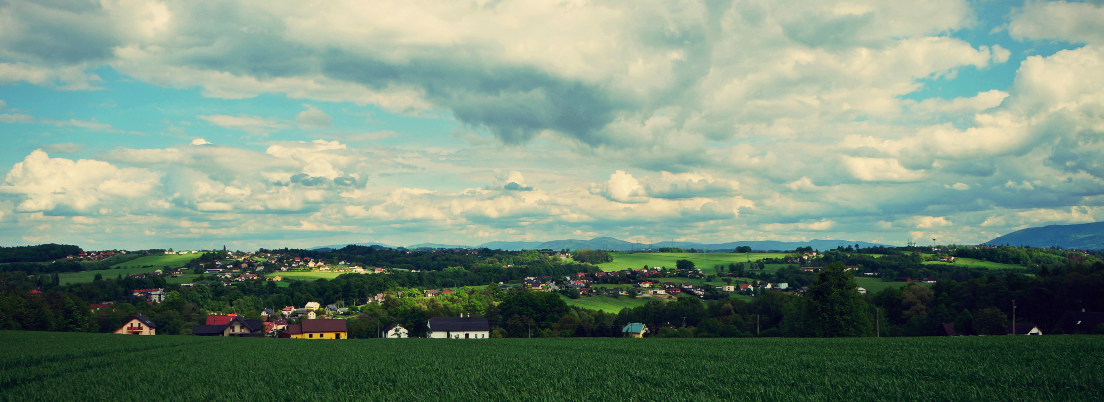 Pohled na krajinu, ve které se obec nachází.